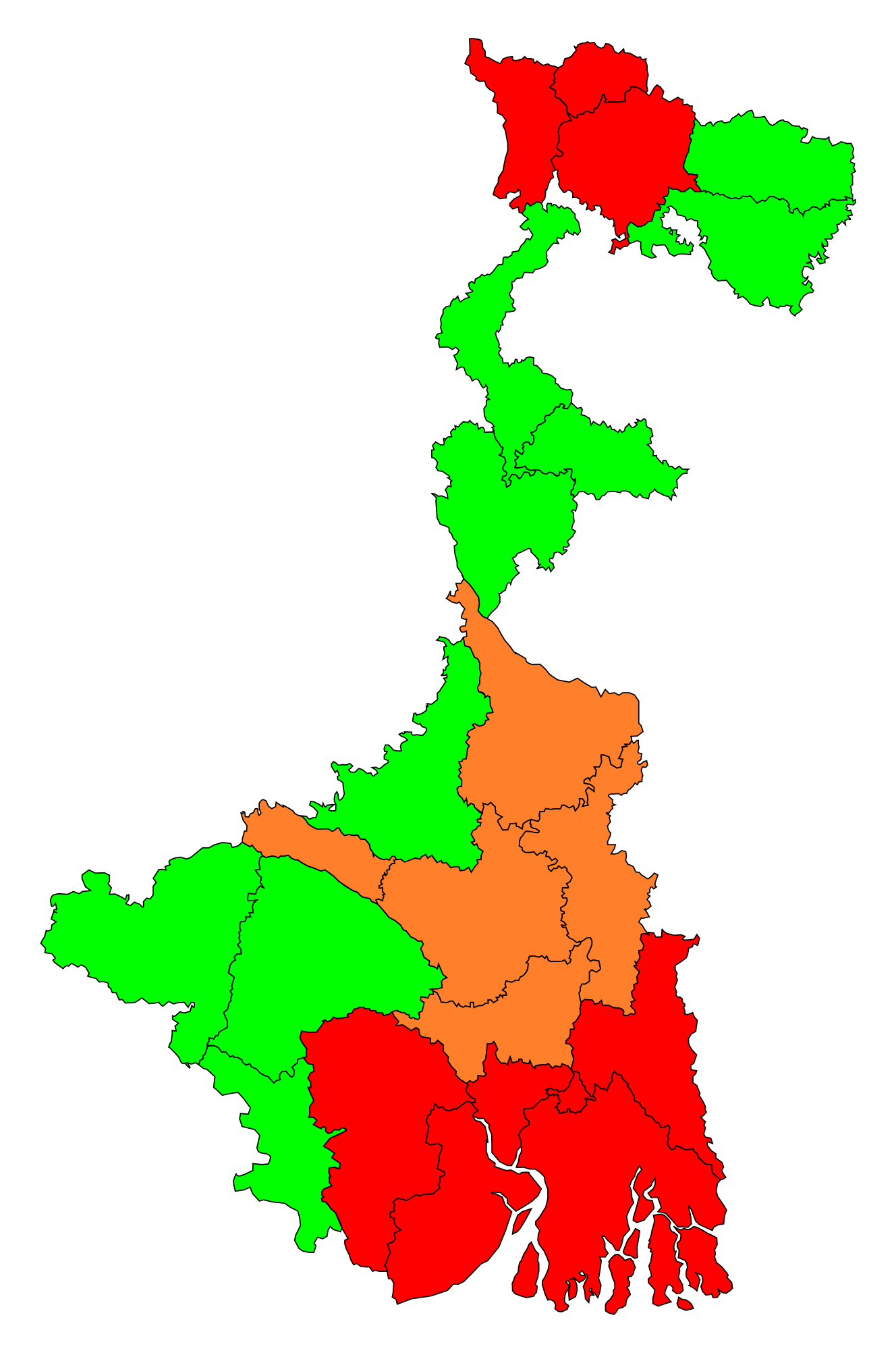 West Bengal COVID 19 Red Orange and Green Zone, as per center data 1st May 2020